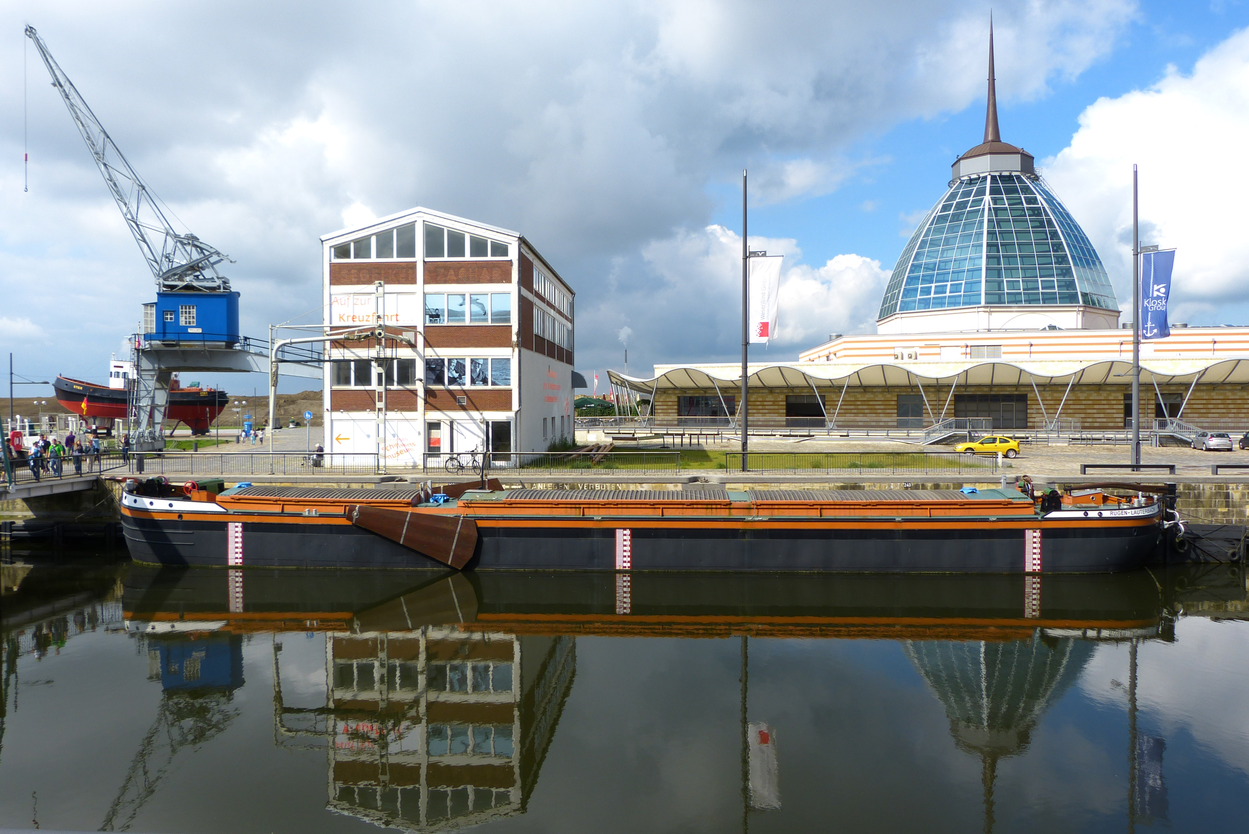 Haffkahn "Emma" in Bremerhaven,Das abgebildete Objekt ist ein geschütztes Kulturdenkmal in der Freien Hansestadt Bremen, mit der Nr. 1737,T007 beim Landesamt für Denkmalpflege registriert.